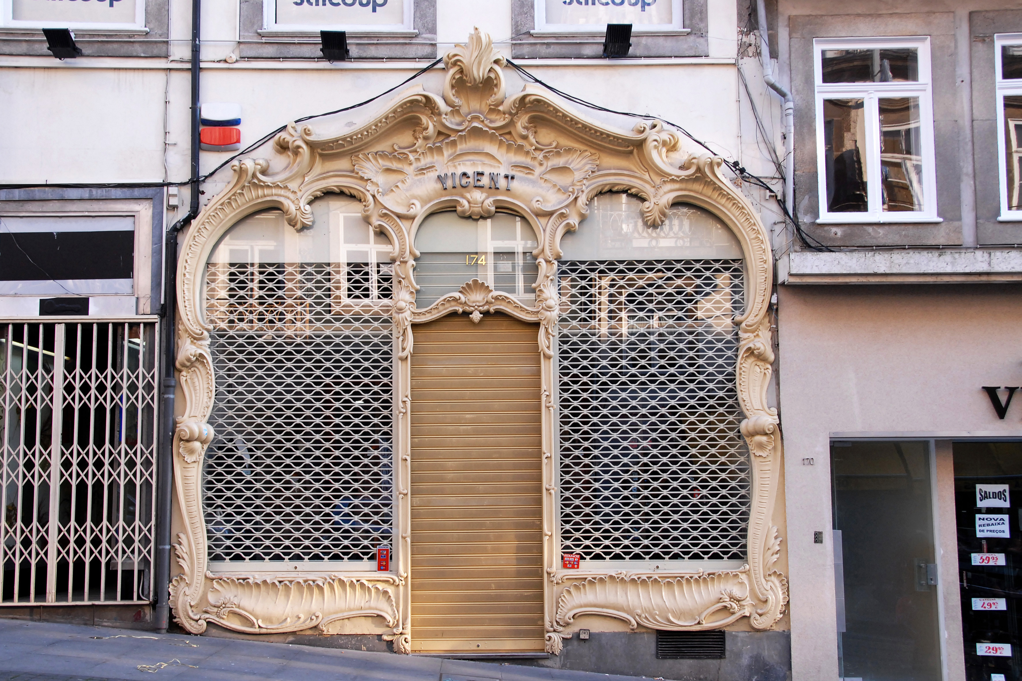 Casa Vicent This file was uploaded for Wiki Loves Monuments in Portugal with the unique identifier 342627.